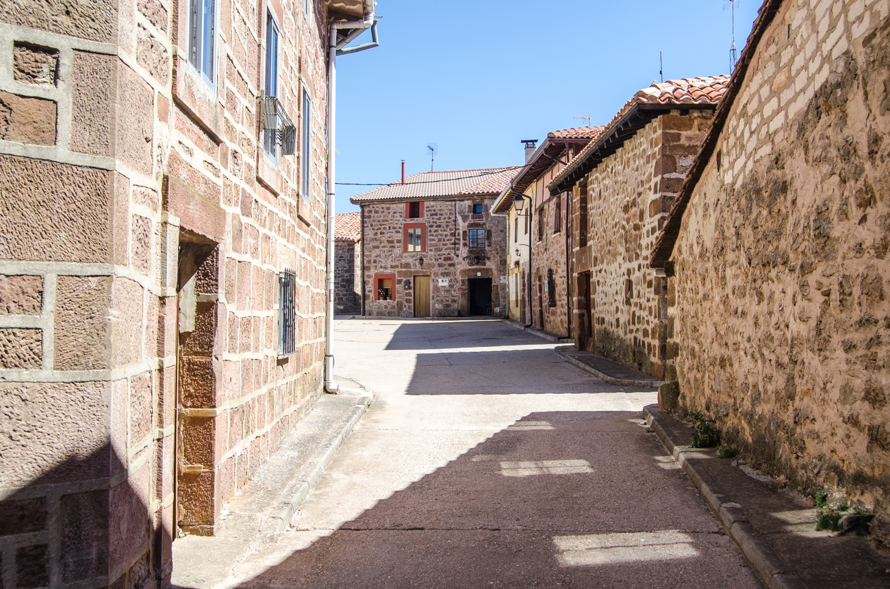 Urrez. Calle típica en el caso viejo.